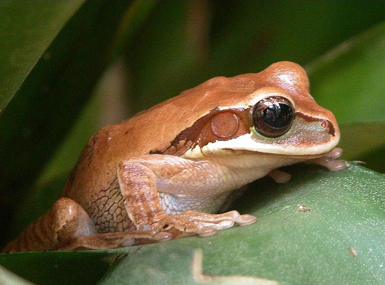 Selbst fotografiert. Aufgenommen mit einer Nikon Coolpix 5700 im Frankfurter Zoo. Fotograf/Quelle: Wilfried Berns / Motiv: Costa Rica-Laubfrosch (Smilisca phaeota)